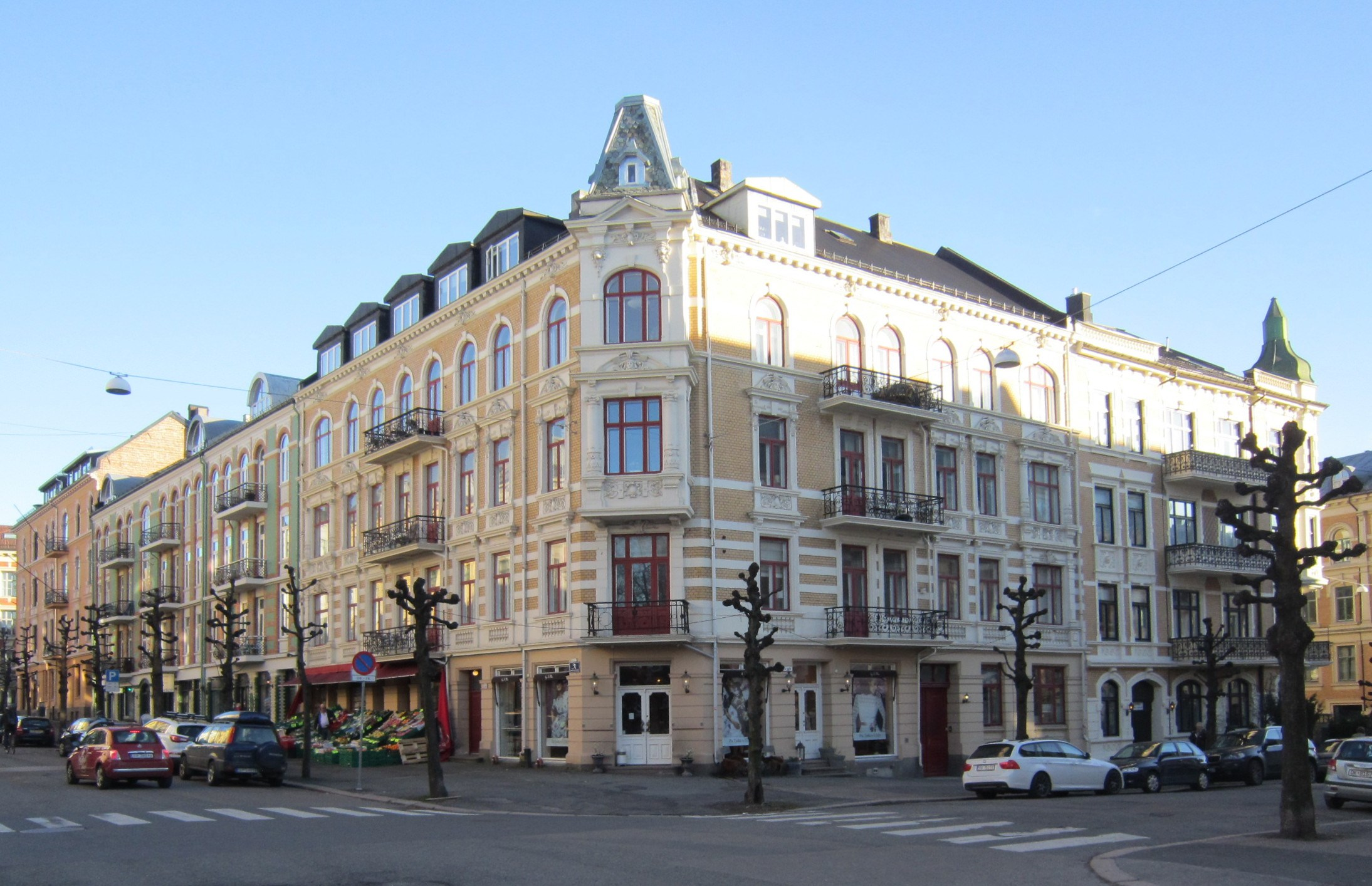 Niels Juels gate 33, hjørnegård mot Colbjørnsens gate